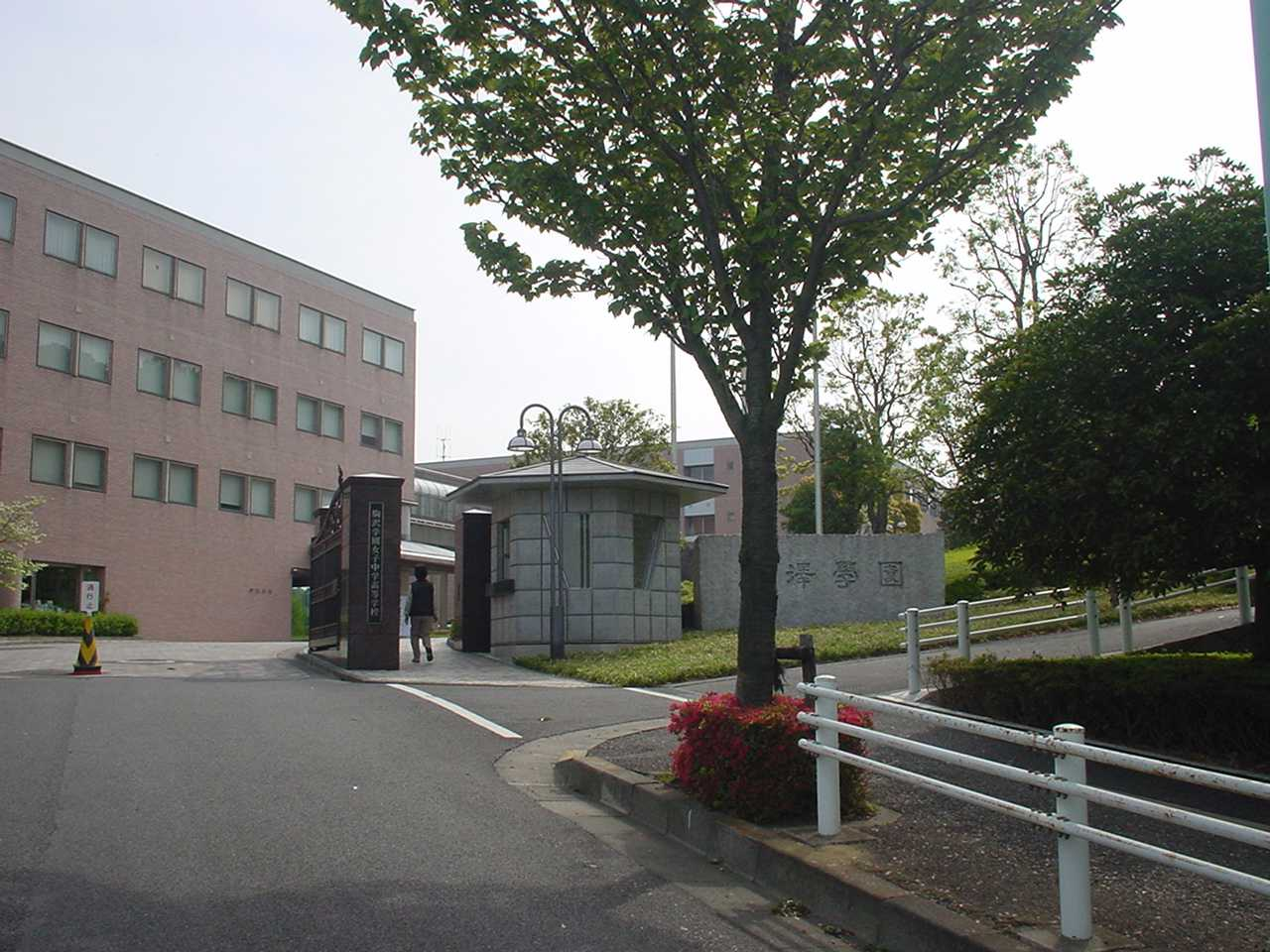 駒澤女子大学